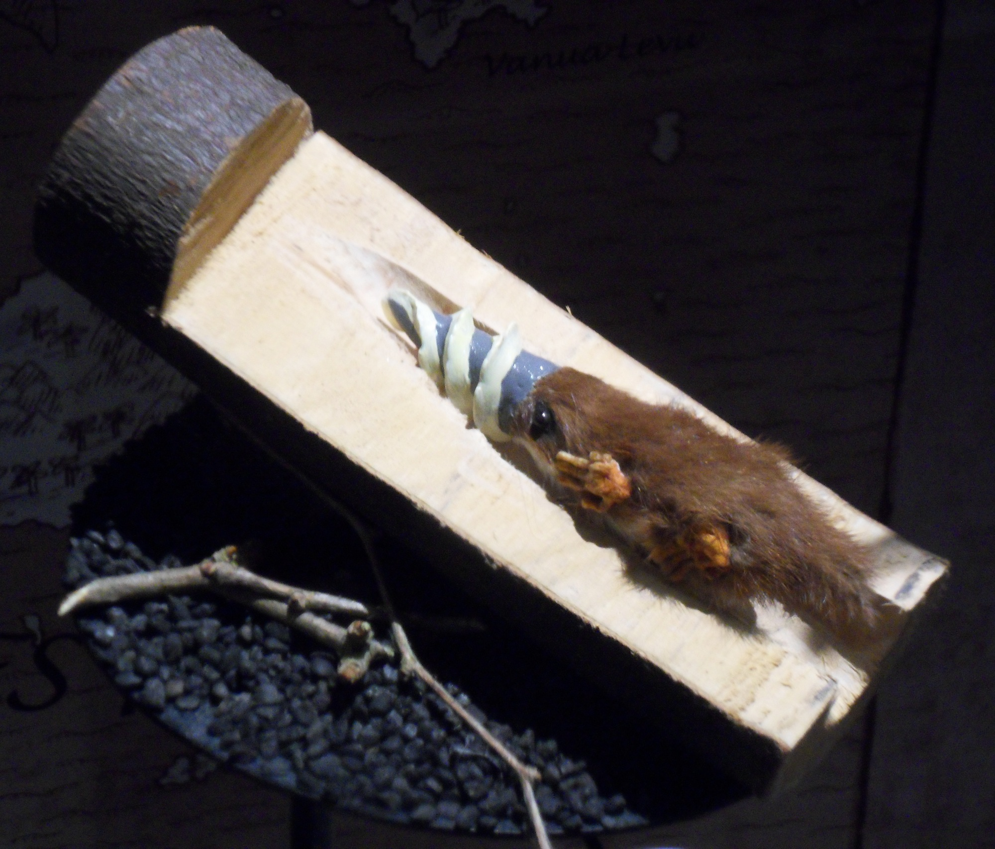 Un Rhinograde du genre Nasoperforator dans la Salle des espèces disparues et menacées de la Grande Galerie de l'évolution du Muséum d'histoire naturelle de Paris.